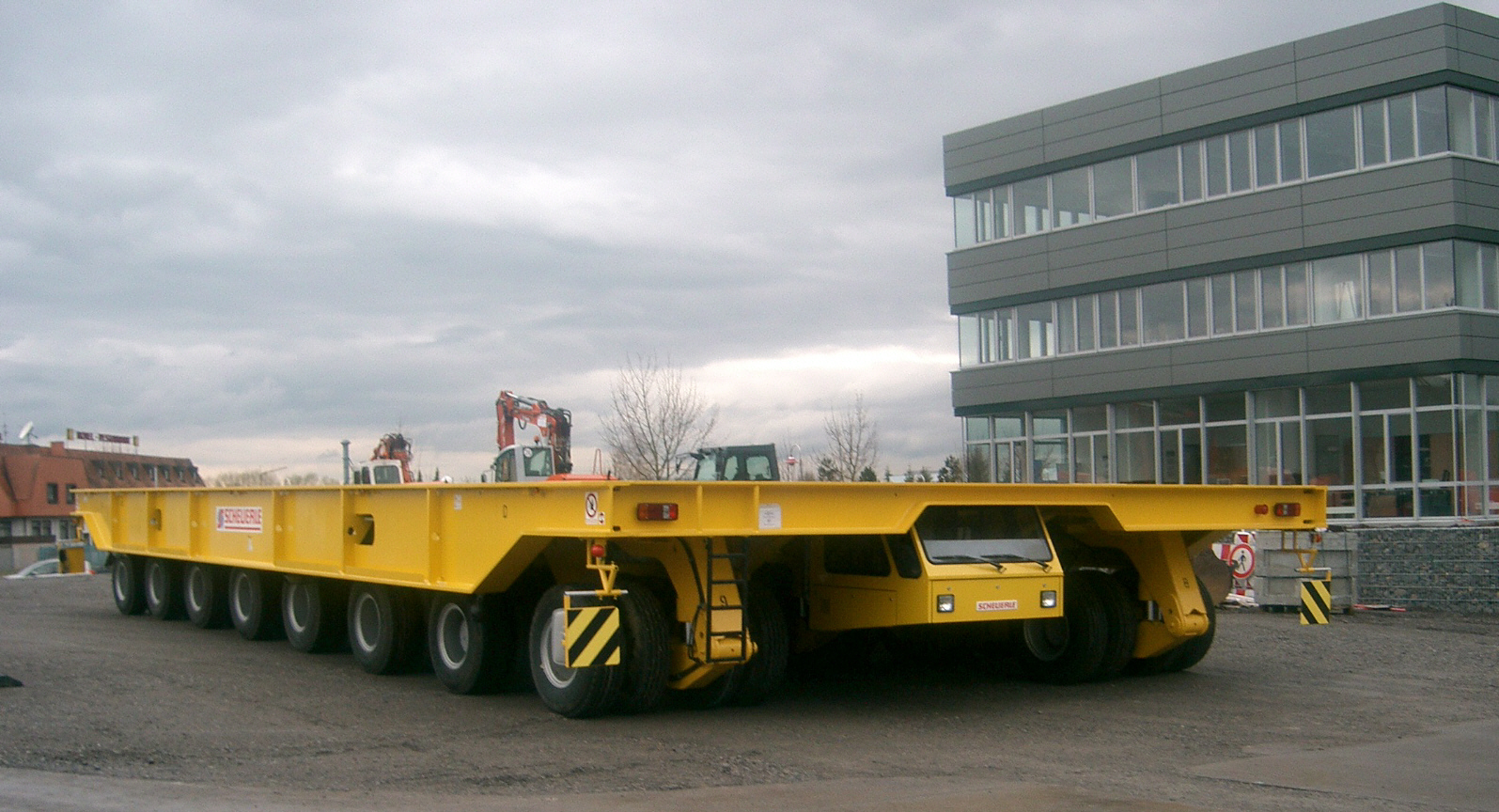 Schwerlast Tieflader der Firma Scheuerle vor dem neuen Verwaltungsgebäude